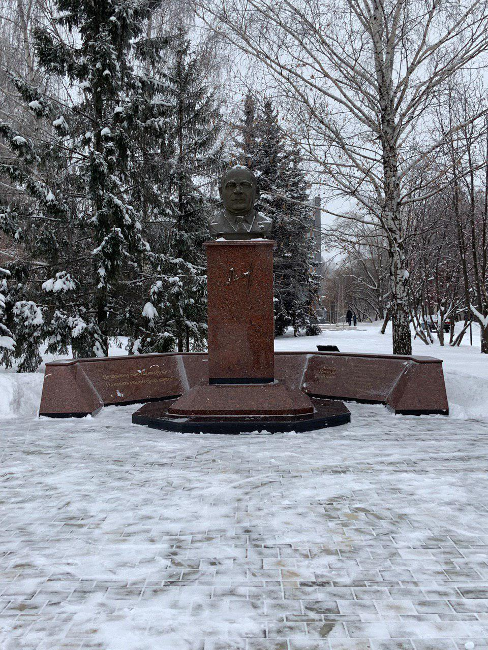 Памятник Николаю Васильевичу Лемаеву, Герою Социалистического Труда, заслуженному деятелю науки и техники РСФСР, министру нефтехимической промышленности СССР, первому генеральному директору Нижнекамскнефтехима — «отцу» города Нижнекамска. Открыт в сквере Лемаева в 2001 году (скульптор — Р. Сафин, архитектор — Ф. Г. Ханов).